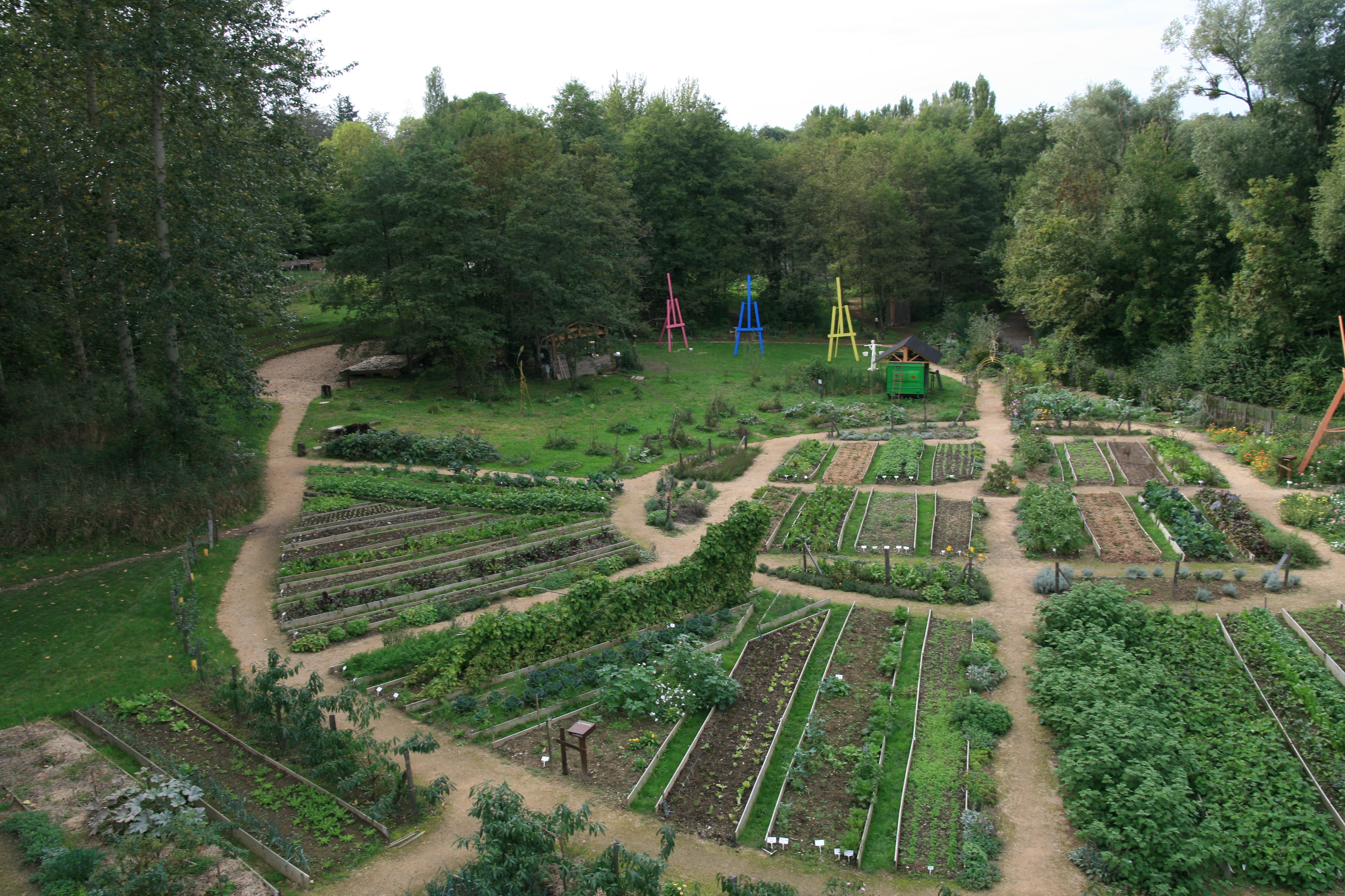 Photo aérienne du jardin (jardinons ensemble)